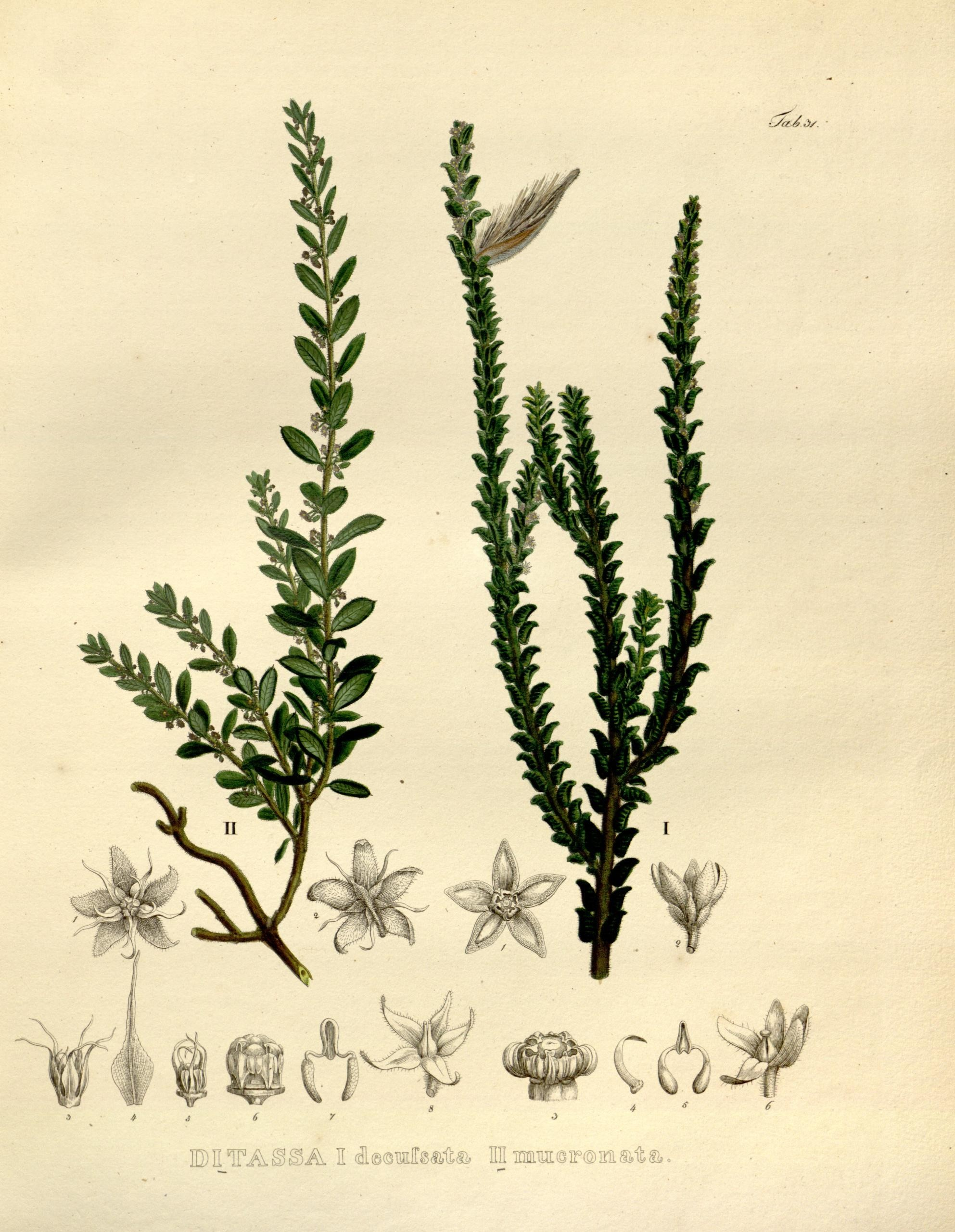 1. Ditassa decussata, 2. Ditassa mucronata Nova genera et species plantarum. Monachii [Munich] :Impensis Auctoris,1824-1829 [i.e. 1824-32]..